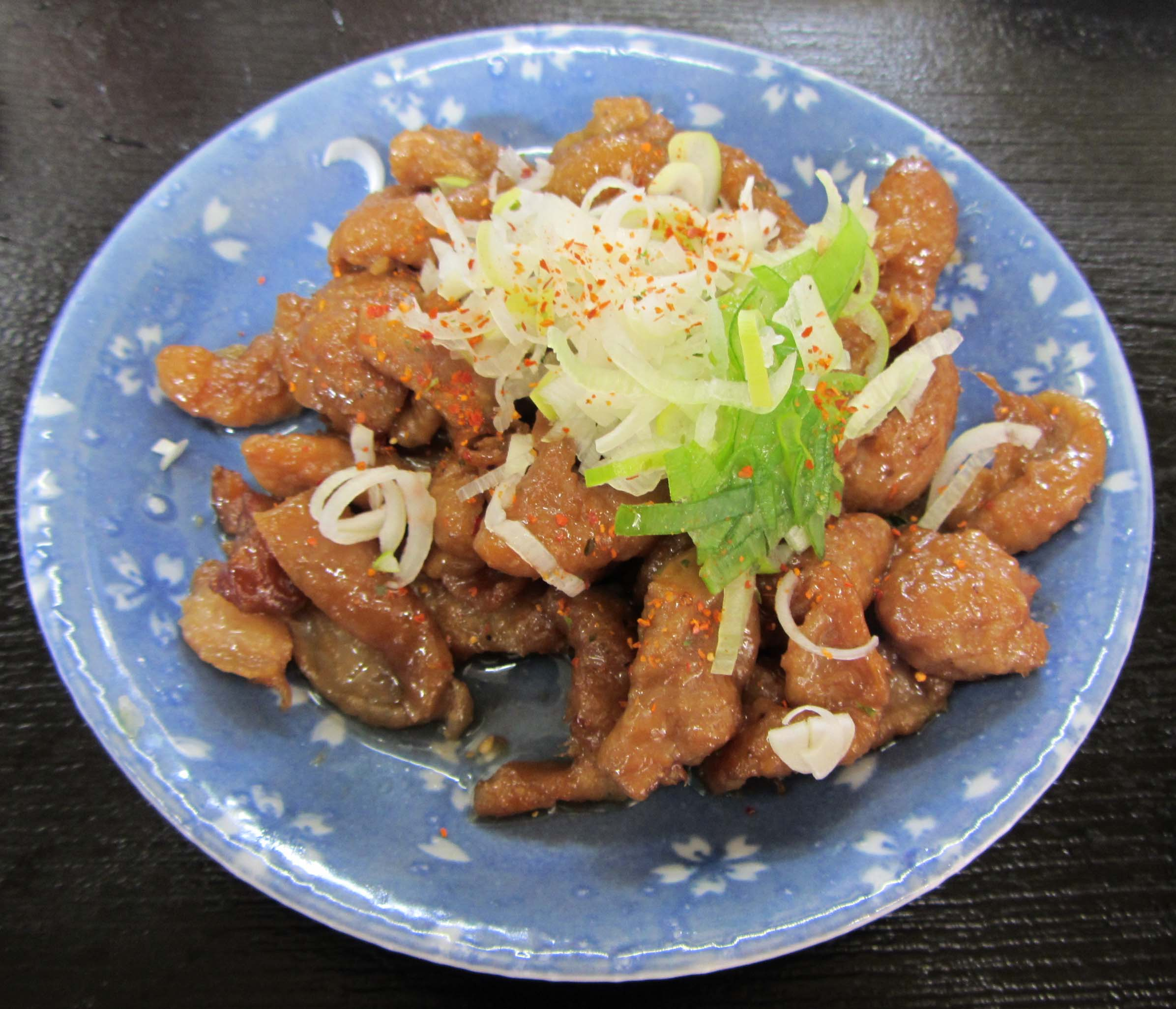 塩川の鳥モツ